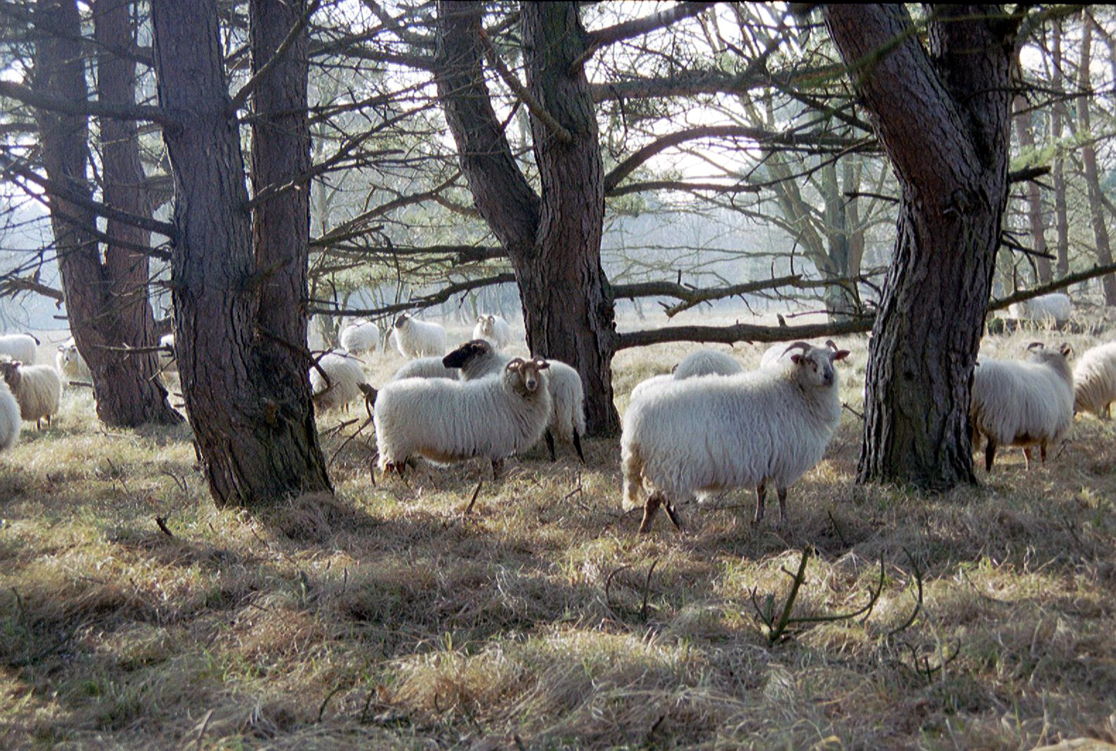 Schapen, De Zilk, Nederland